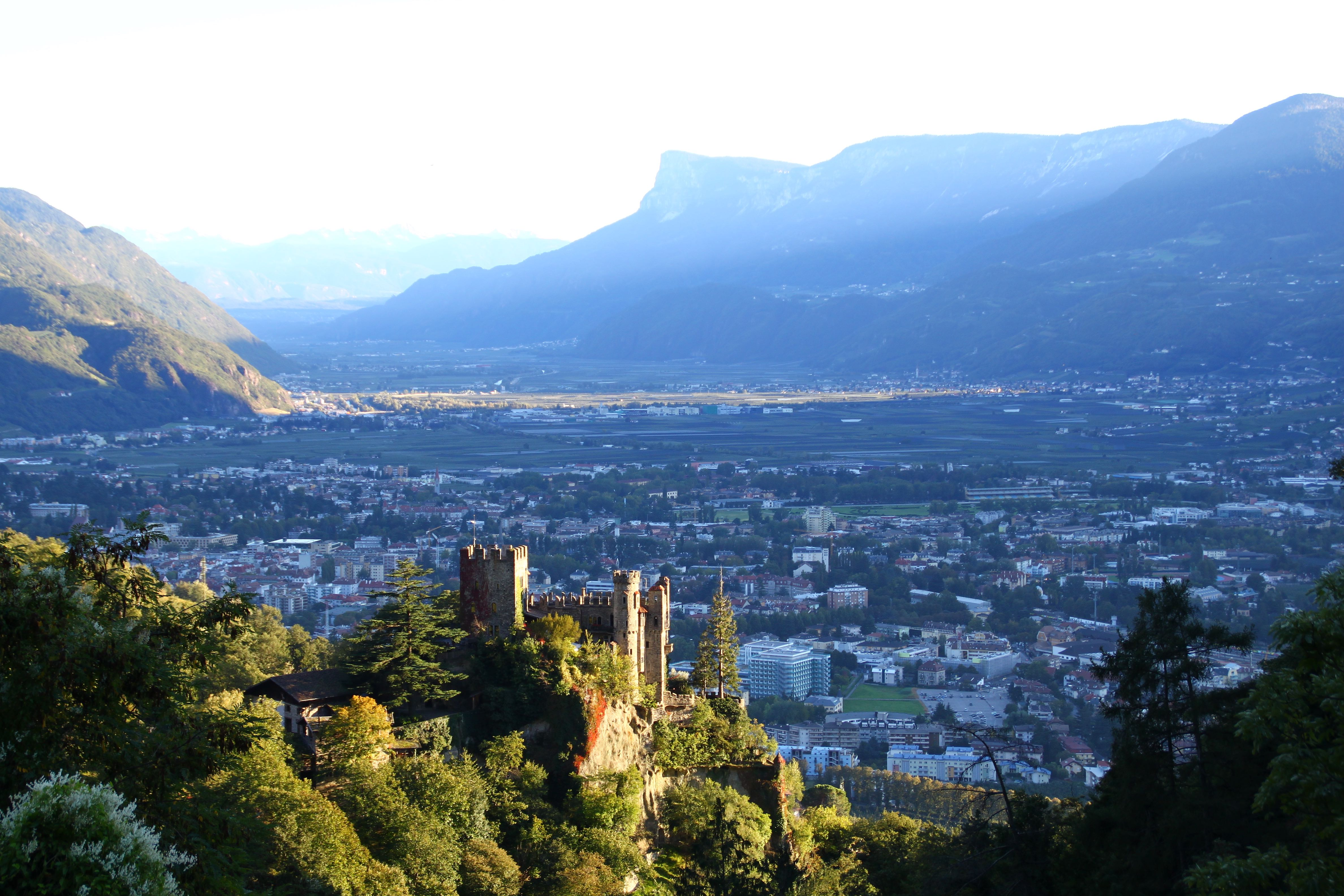 Brunnenburg mit Meran